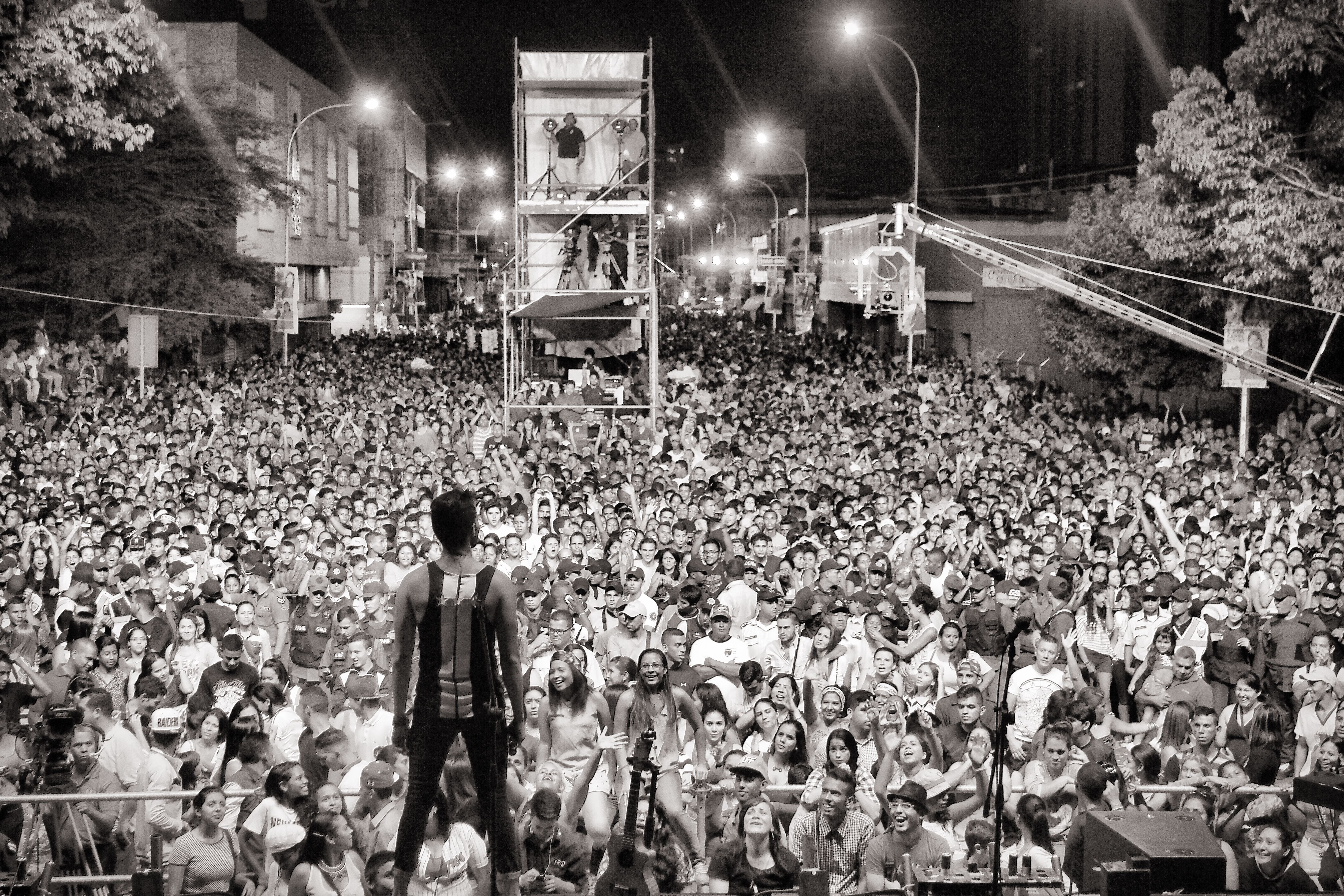 Alkilados en Venezuela (2015)